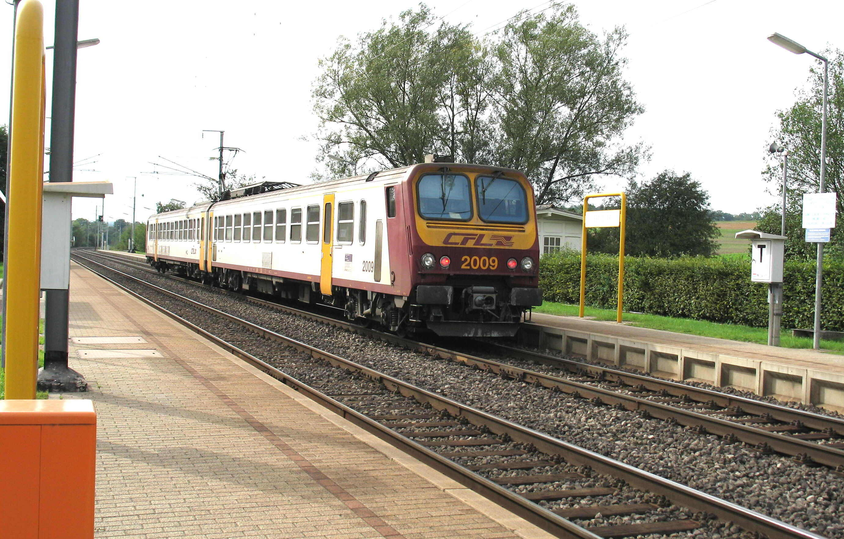 Gare vu Betzder